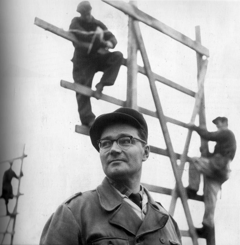 Suomalainen kirjailija Kalle Päätalo (1919–2000) marraskuussa 1958 Kangasalan kirkonkylän kansakoulun rakennustyömaalla.